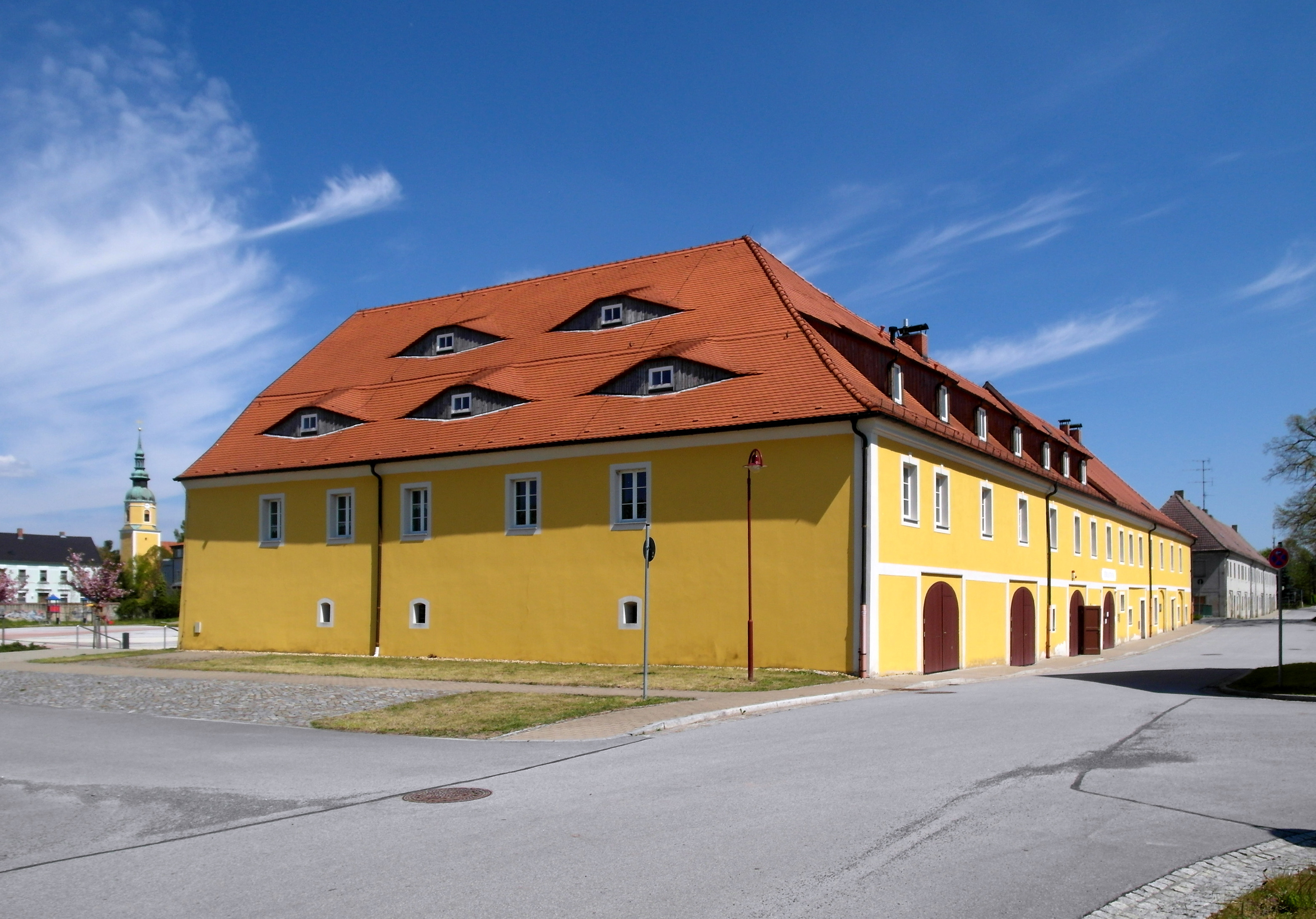 06.05.2016 02699 Königswartha: Ehem. Rittergut Königswartha, Gutsstraße (GMP: 51.308601,14.326032) Im westlichen Bereich der heutigen Schloßanlage befand sich bereits im 13. Jh. eine Wasserburg, die als Warte des Königs von Böhmen die alte Straße von Bautzen nach Hoyerswerda sichern sollte. Nach der Sanierung beherbergt das Gebäude u.a. eine öffentliche Bibliothek. [SAM5673.JPG]20160606470DR.JPG(c)Blobelt